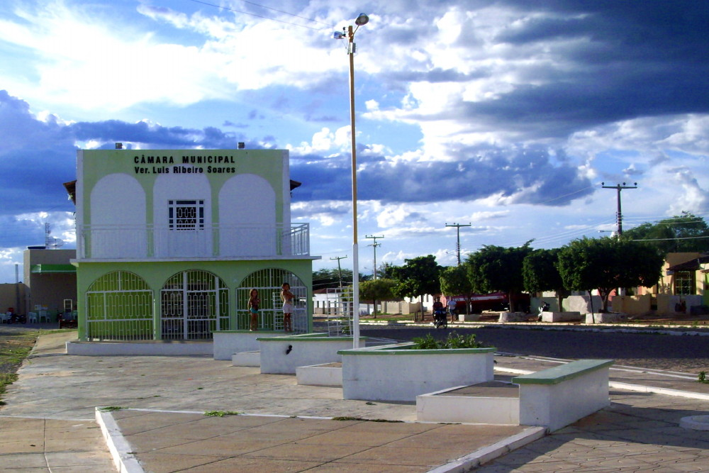 Câmara Municipal de Vereadores (2014)